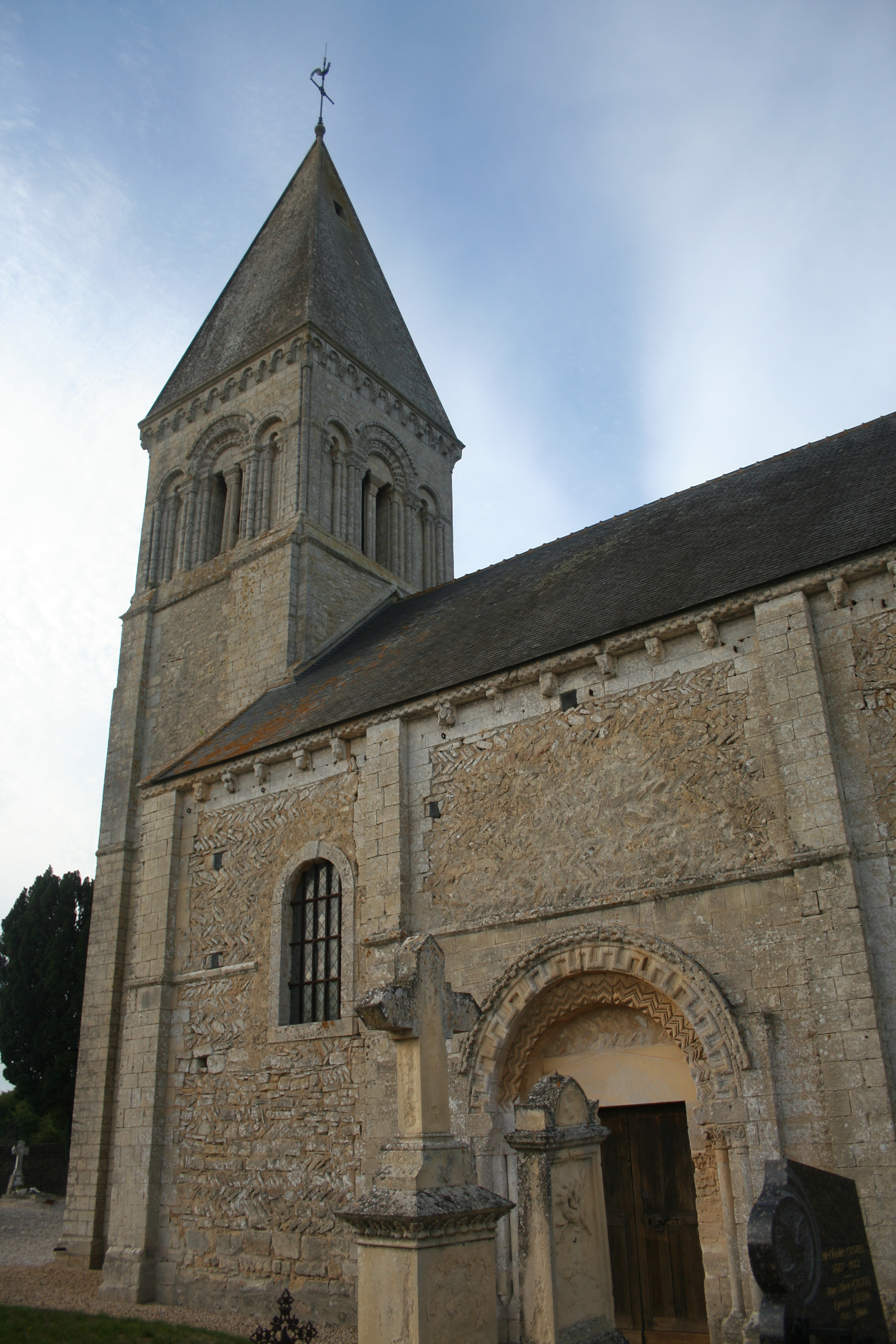 église saint Pierre de Vienne en Bessin (Calvados, Normandie, France)